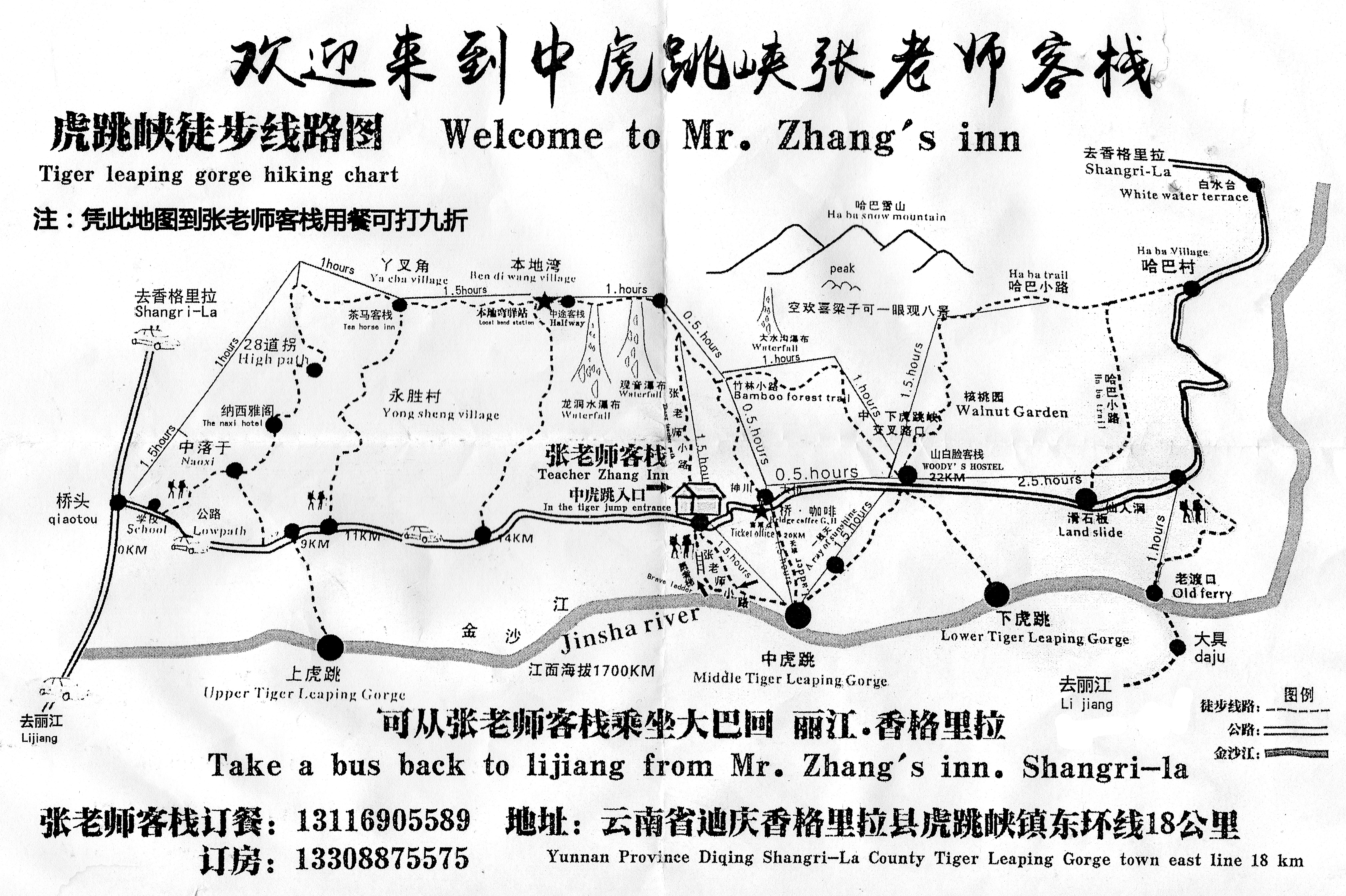 mapa szlaków / hiking chart